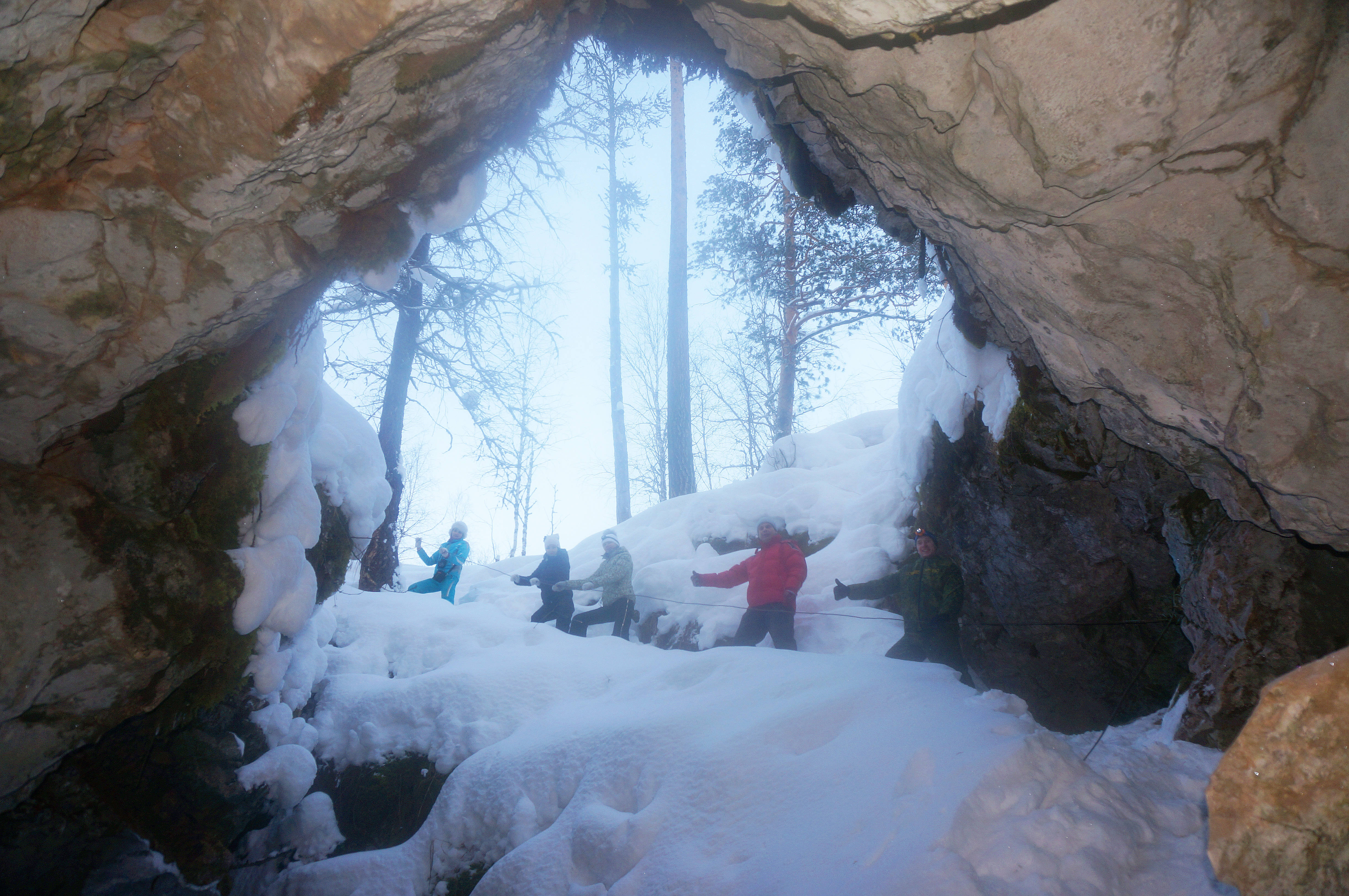 Шемахинское карстовое поле: Памятник природы Шемахинское карстовое поле расположен в окрестностях станции Сказ и состоит из 4 чересполосных участков. Занимает территорию ограниченную на севере и северо-западе долиной реки Гремучей (Верхняя Шемаха), на западе – долиной реки Сухой Шемахи, на юге и юго-востоке – долиной реки Нижней Шемахи (Морозкина), на востоке – хребтом Бардымским,Нязепетровский район, Челябинская область This image is related to the protected area of Russia number 7410227